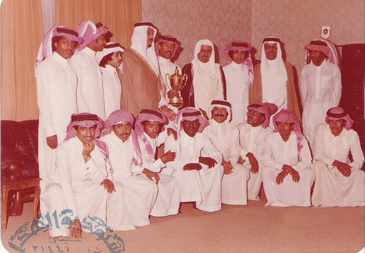 Al-Hilal playres visiting Salman in Ryiadh